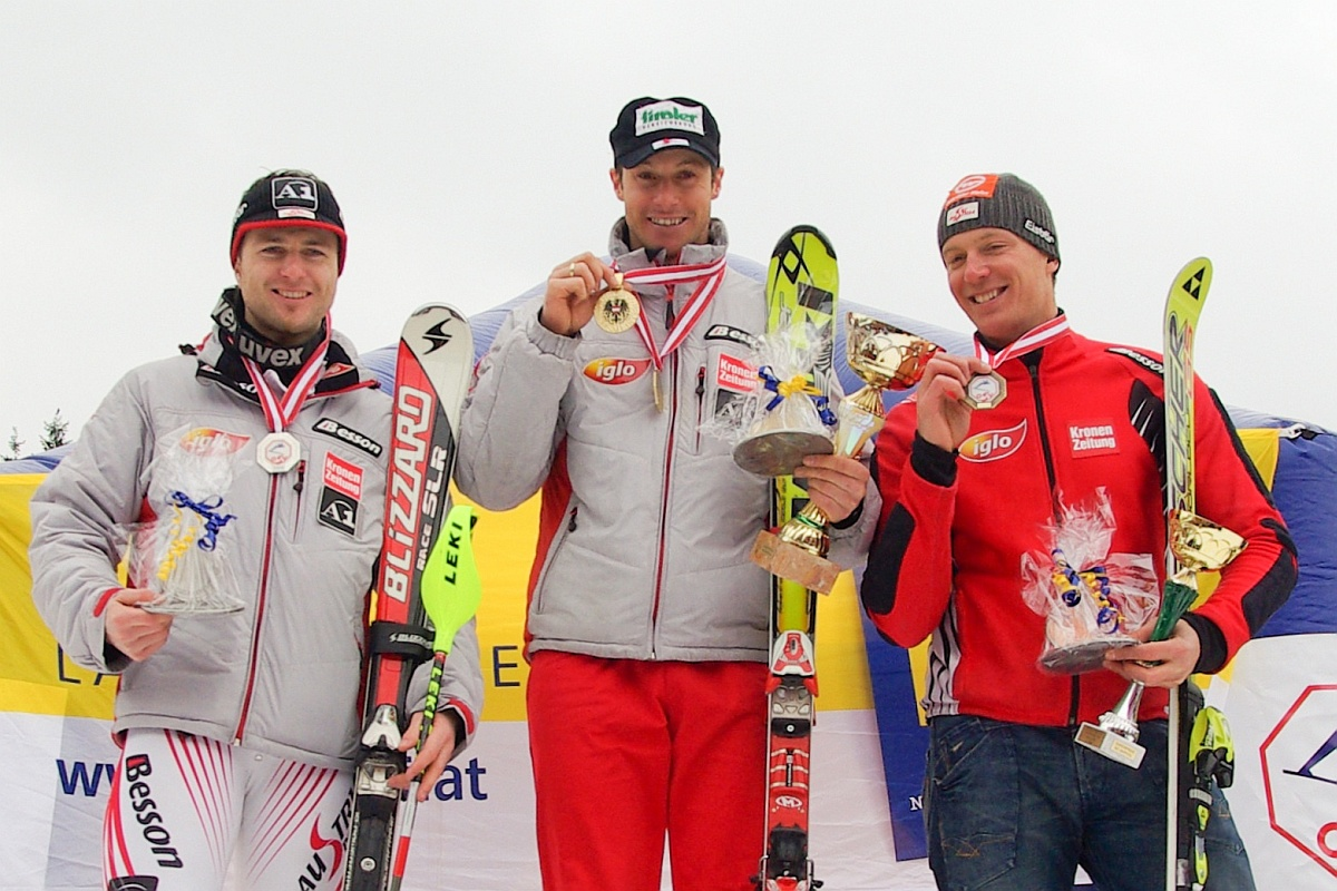 Die Sieger des Slaloms der Österreichischen Alpinen Skimeisterschaften 2009: 1. Platz: Manfred Pranger (mitte), 2. Platz: Reinfried Herbst (links), 3. Platz: Andreas Omminger (rechts)